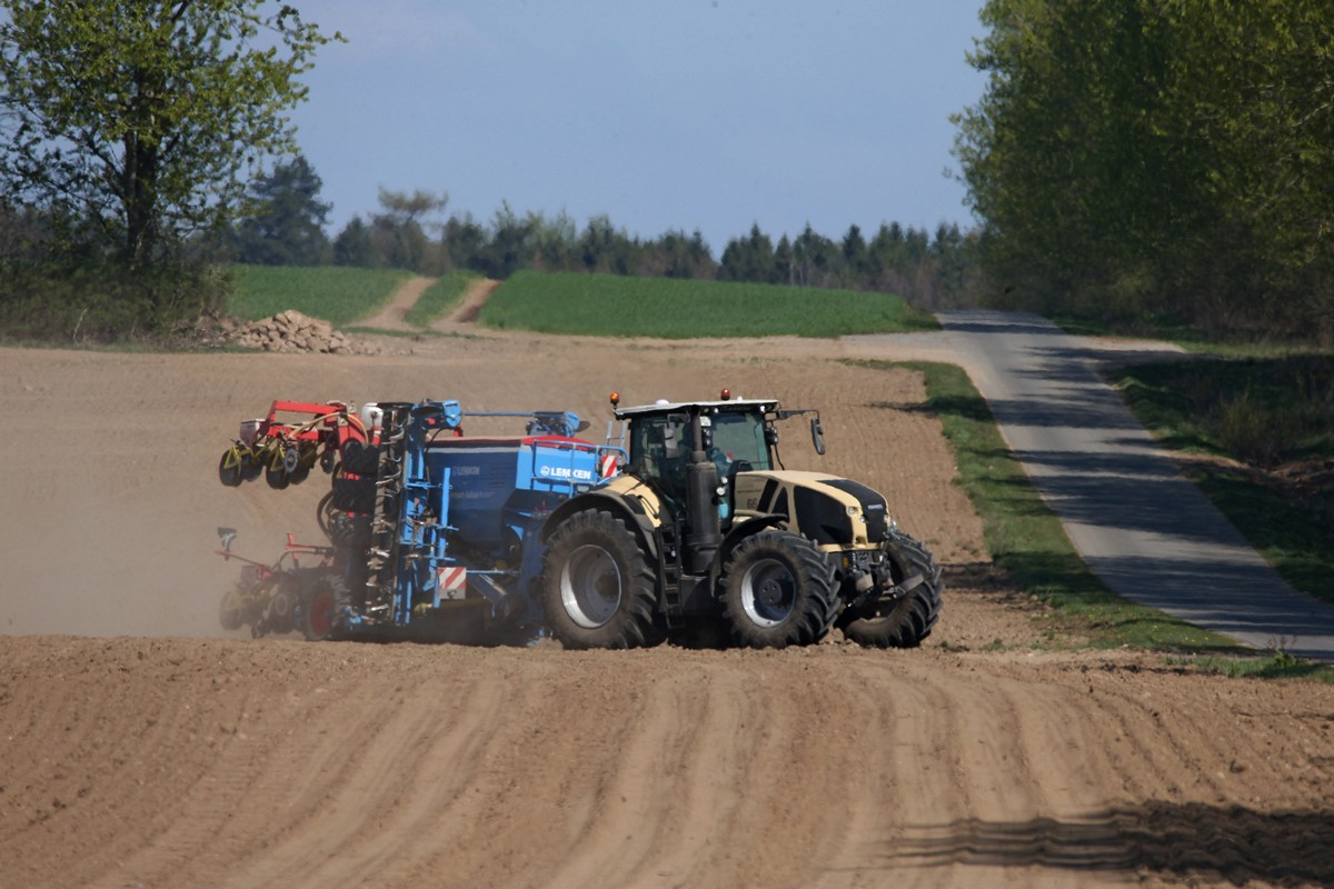 Sämaschine (Drillmaschine) auf trockener Erde in Südmecklenburg